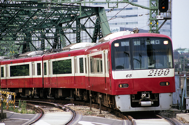 京急2100形電車による快特 2005年8月9日 京急 品川〜北品川 投稿者撮影